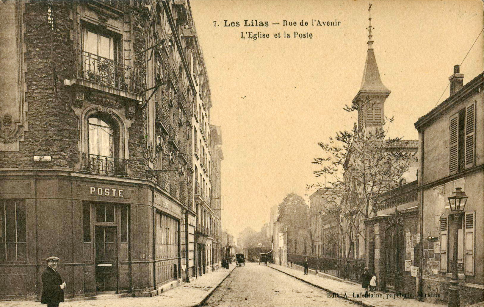 Carte postale ancienne éditée par A. Lafontaine, n°7 :LES LILAS - Rue de l'Avenir